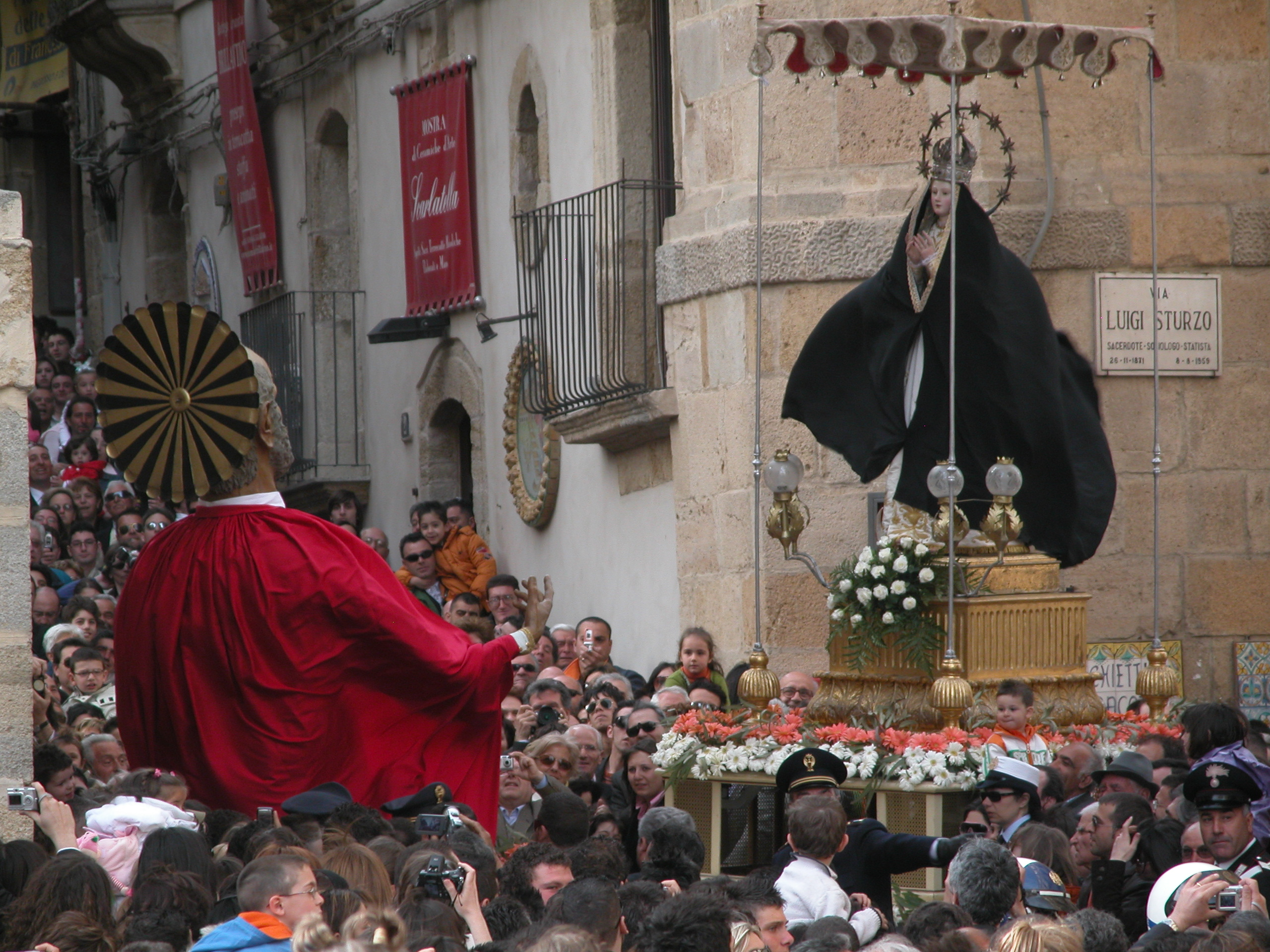 'A Giunta